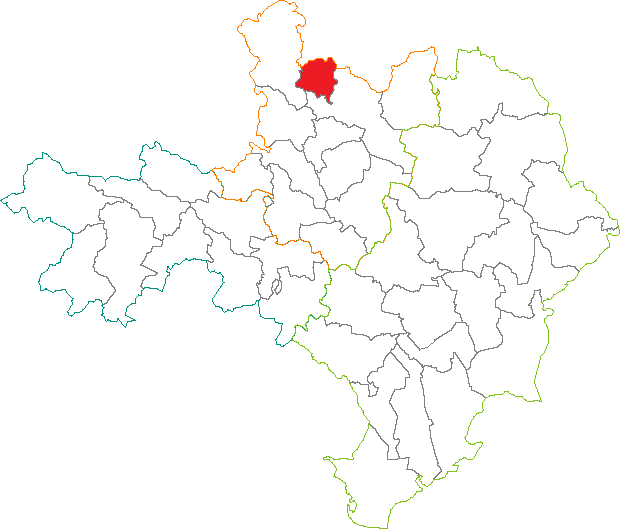 Situation du canton dans le département du Gard (France)